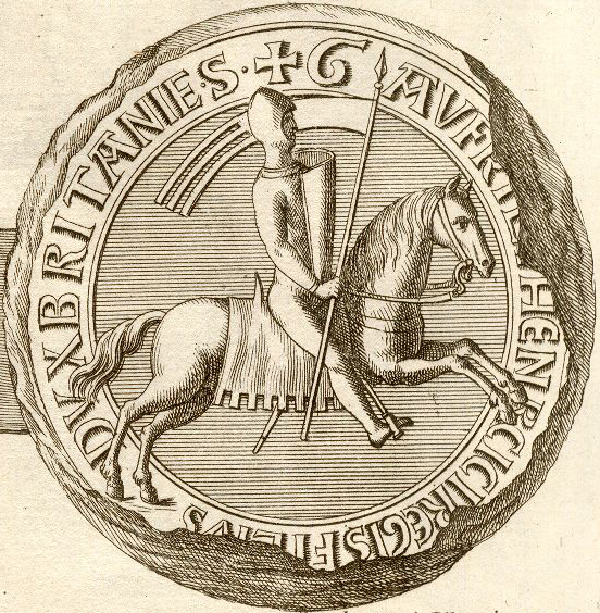 Sceau de Geoffroi II, Duc de Bretagne